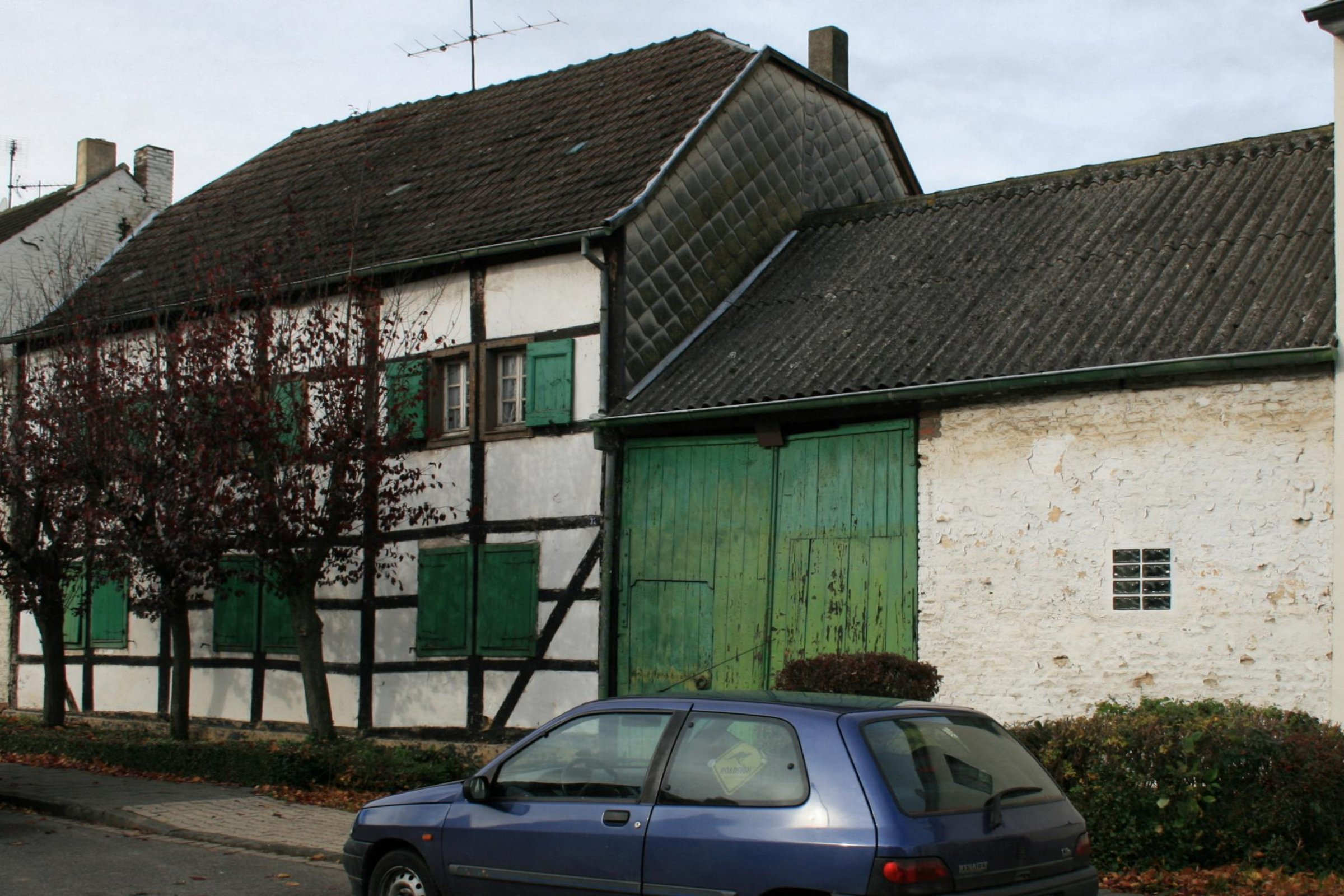 Ehem. Fachwerk-Bauernhof Heribertstr. 32 in Nörvenich-Eschweiler ü.F.